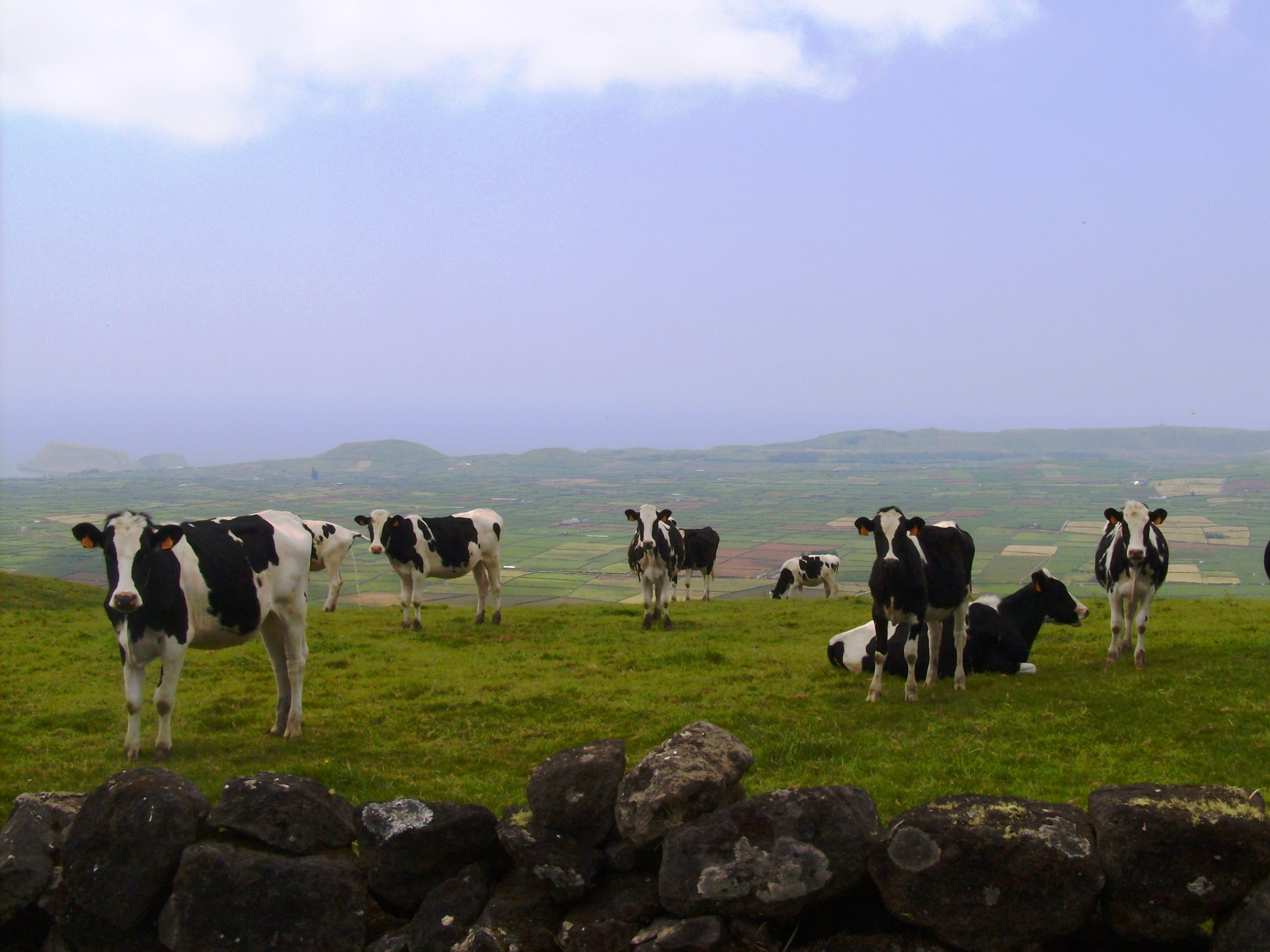 Gado bovino holandês (raça Holstein) em pasto na serra do Cume, Praia da Vitória, ilha Terceira, Açores.